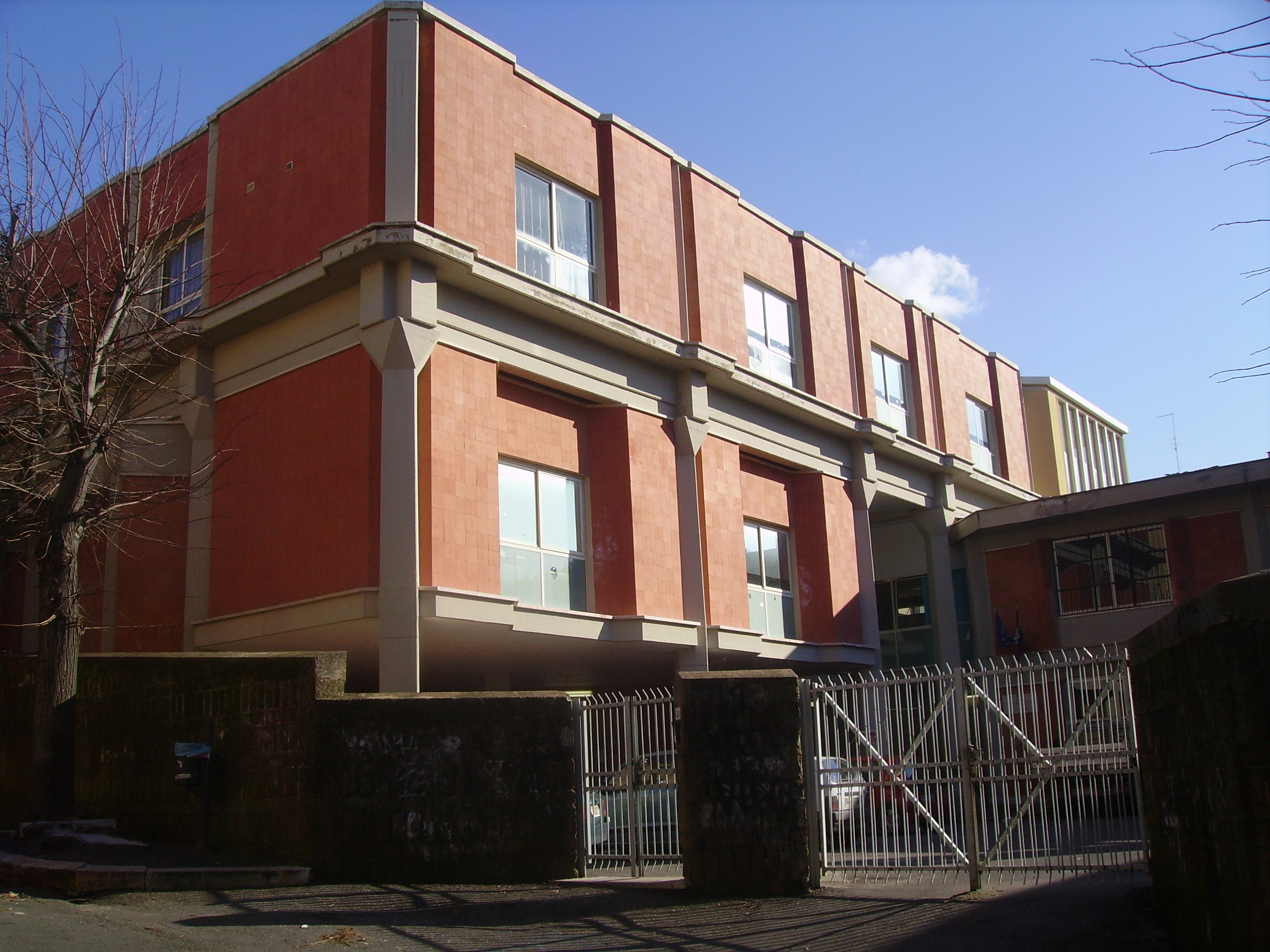 Facciata del Liceo Classico Statale Ugo Foscolo ad Albano Laziale (RM)